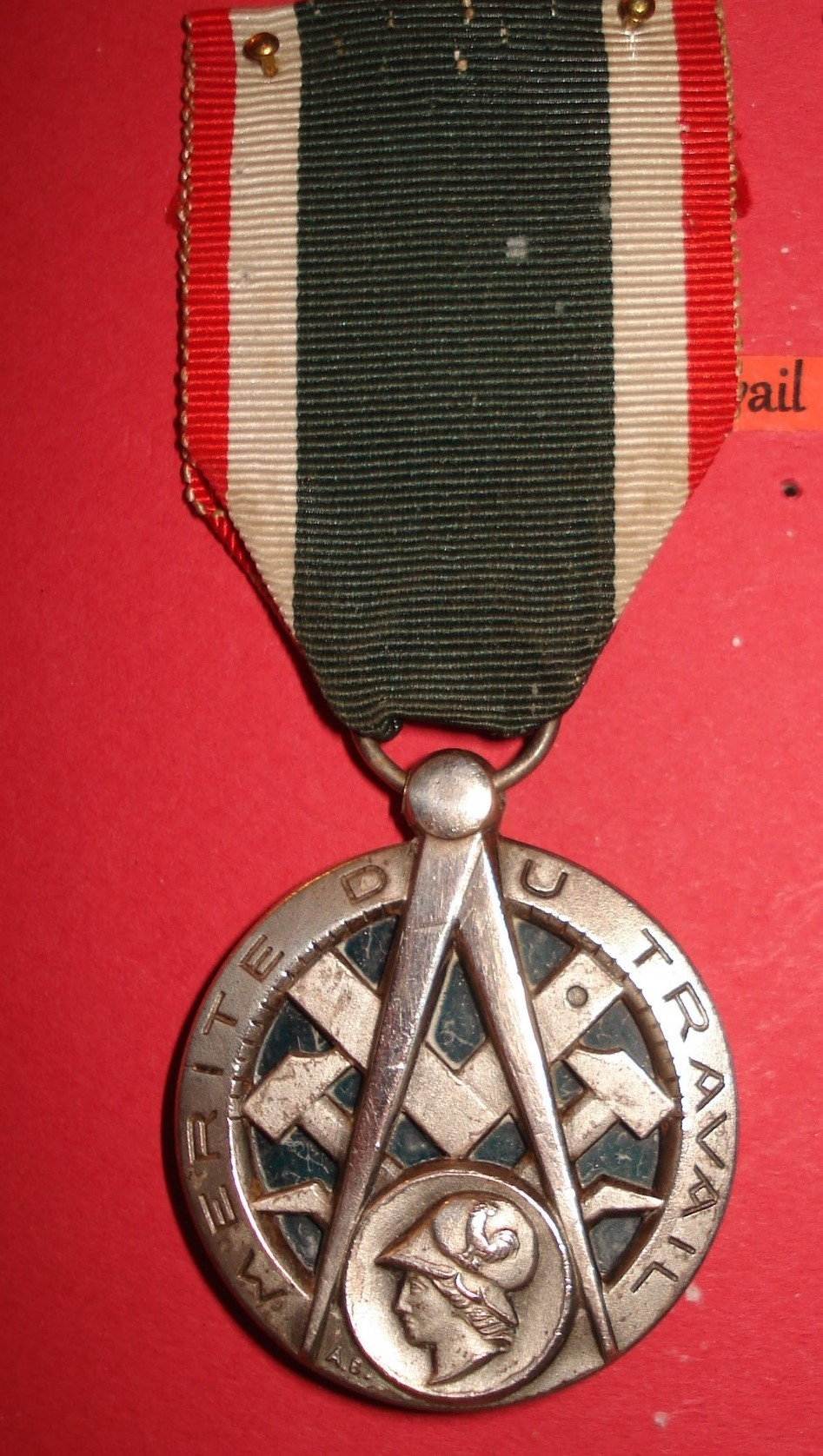 Médaille ronde comportant à l'avers un cercle gravé des mots : MERITE DU TRAVAIL. Le médaillon central une équerre, deux marteaux et deux leviers entrecroisés, le tout surmonté d'un compas dont la boule du sommet sert de support à l'anneau - belière. Ruban vert sombre bordé de chaque côté d'une raie verticale blanc et rouge.